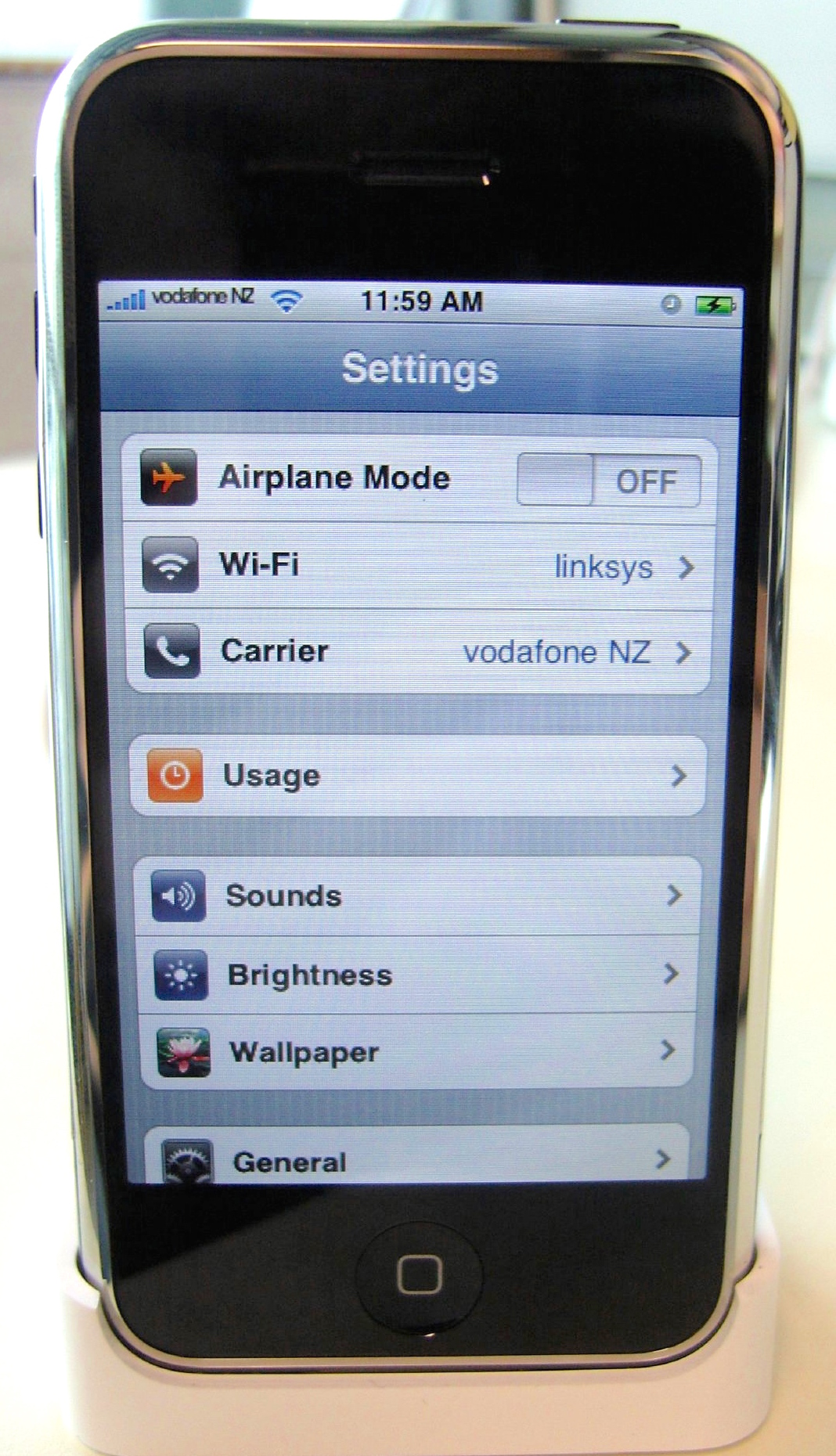 Apple iPhone, eingebucht bei Vodafone New Zealand